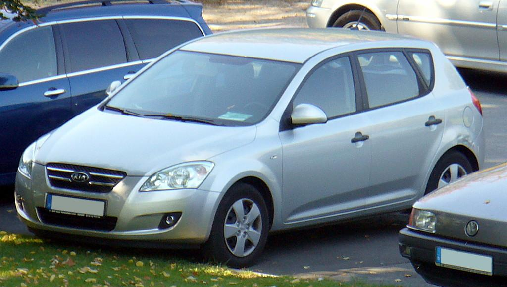 Kia cee'd